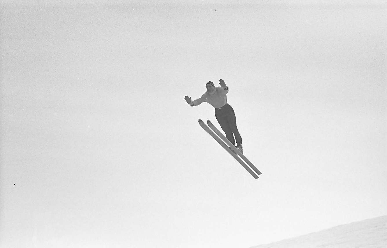 Norwegian ski jumper Jack Alfredsen in Feldberg, Schwarzwald, Germany